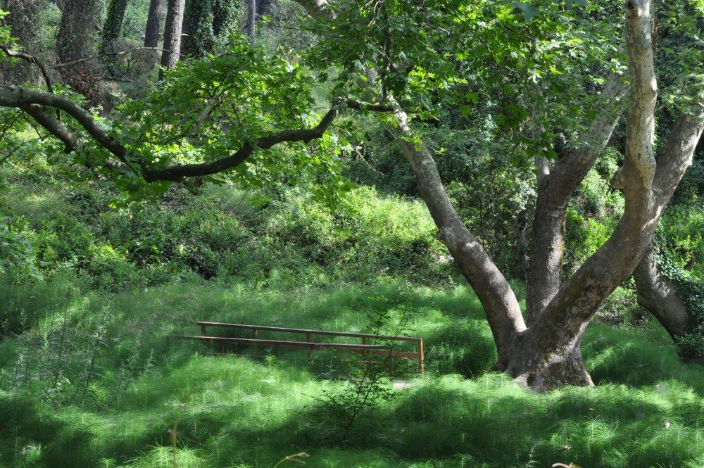 Dawne królewskie lasy w Tatoi, Attyka, Grecja, Park Narodowy Góry Parnitha, 25 km od Akropolu. W poszyciu leśnym bardzo gęsty "dywan" skrzypów, wysokości około 1 metra. The former king's forest in Tatoi, Attica, Greece, Parnitha Mountain National Park, 25 km from the Athens Acropolis